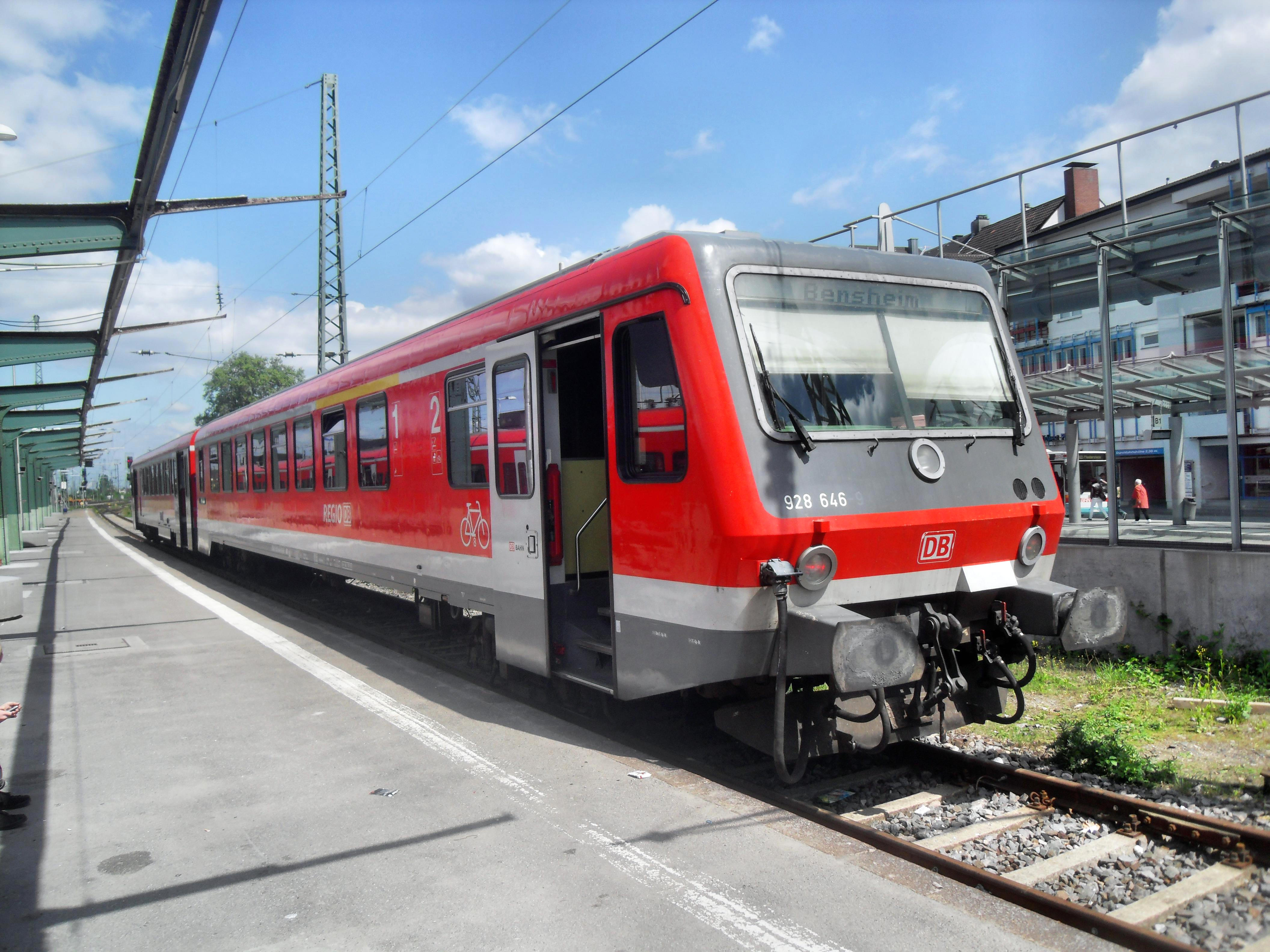 RegionalBahn der DB-Baureihe 628 im Wormser Hauptbahnhof auf dem Weg nach Bensheim über die Nibelungenbahn